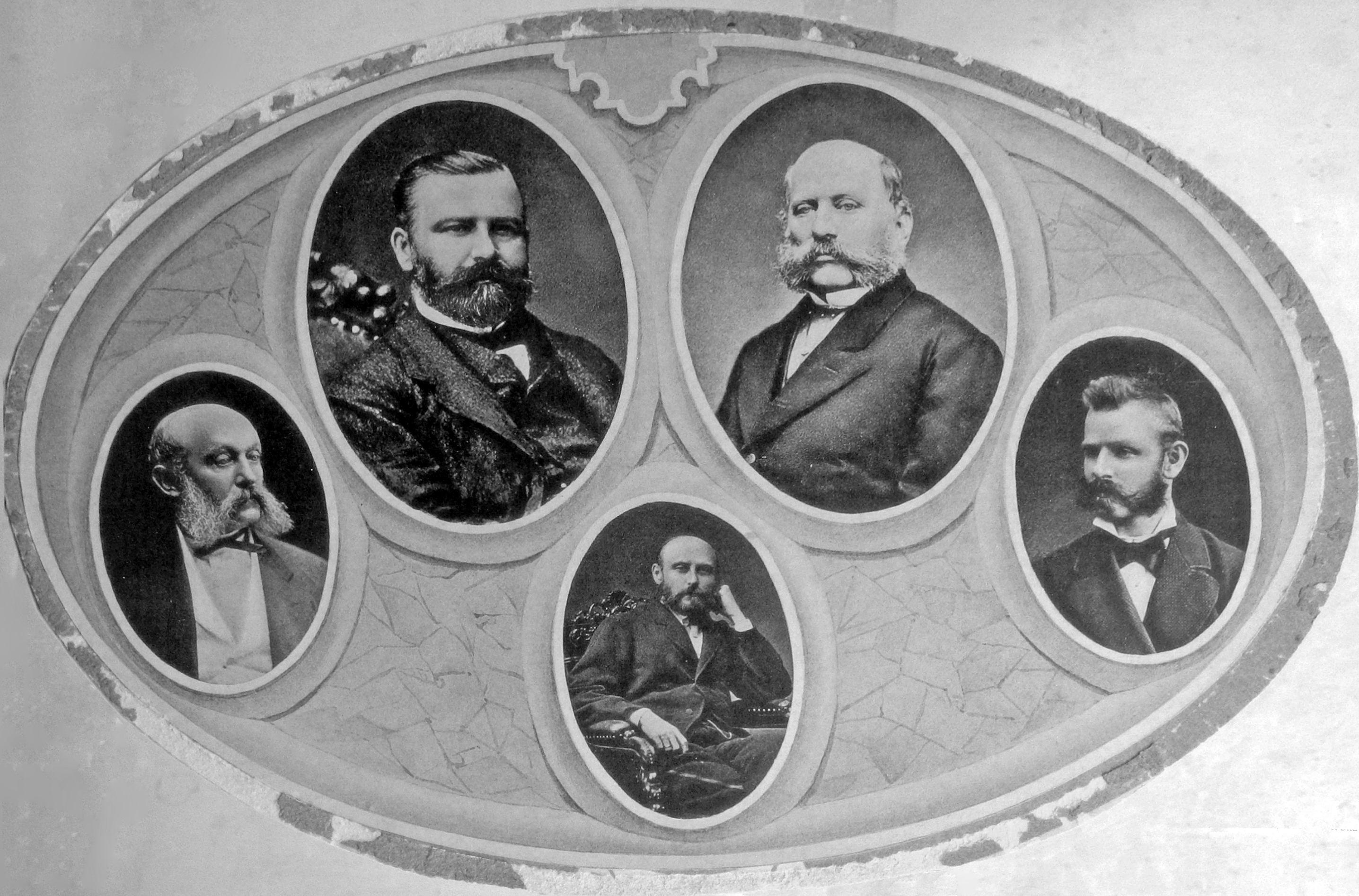 Gesellschafter der Firma „Hielle & Dittrich“ Schönlinde, obere Reihe: Karl Theodor Hielle (1822–1871) und Carl August Dittrich (1819–1886), links: Gustav Dittrich (1815–1890), rechts: Carl Dittrich jr. (1853–1918) und unten: Eduard Josef Hielle (1850–1895). Der spätere geschäftsführende Gesellschafter Herbert Späte ist nicht mit auf dem Bild. (Quelle: Ausstellung anlässlich des Seminars zum 200. Geburtstag von Carl August Dittrich am 4. Okt. 2019 in Krásná Lípa)